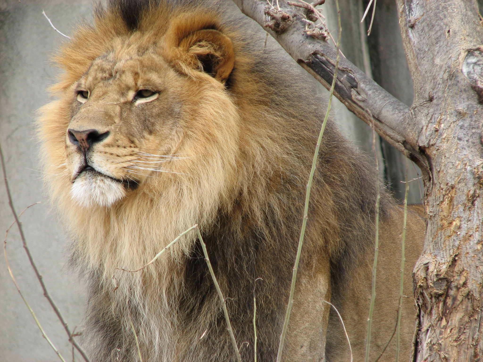 Lion - Louisville Zoo